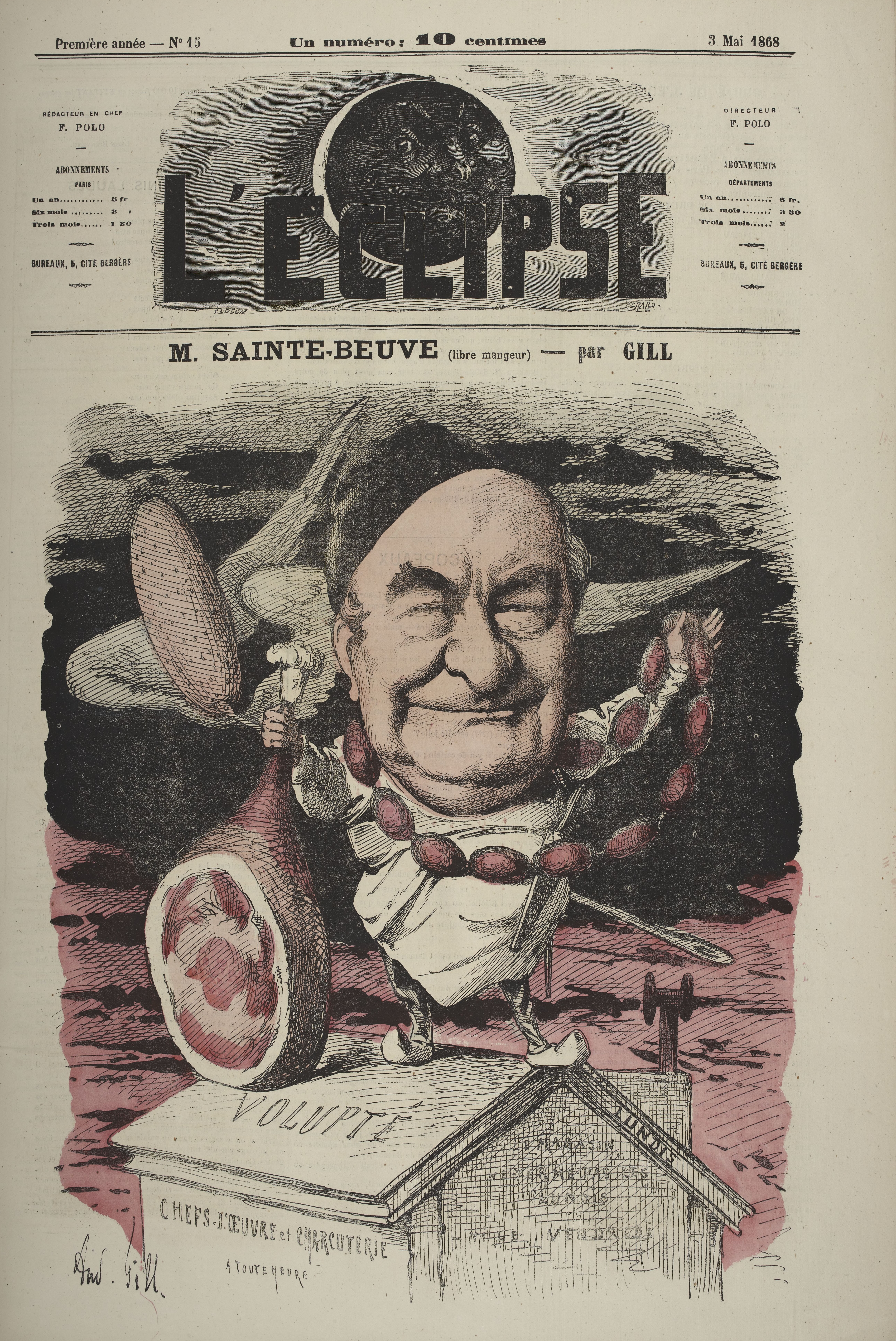 Caricature de Sainte-Beuve par André Gill - dans le journal L'éclipse de 1868